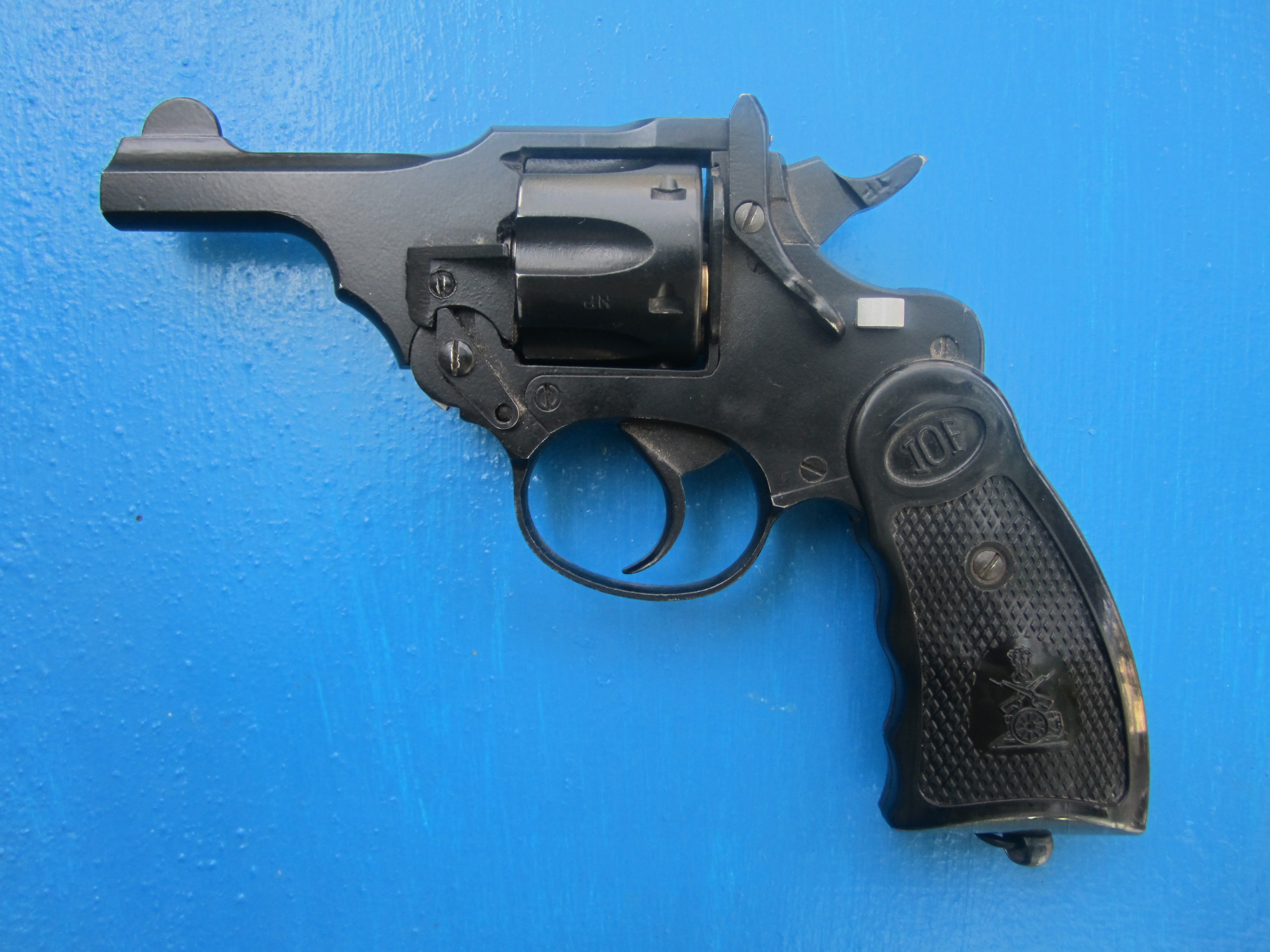 India Pistol